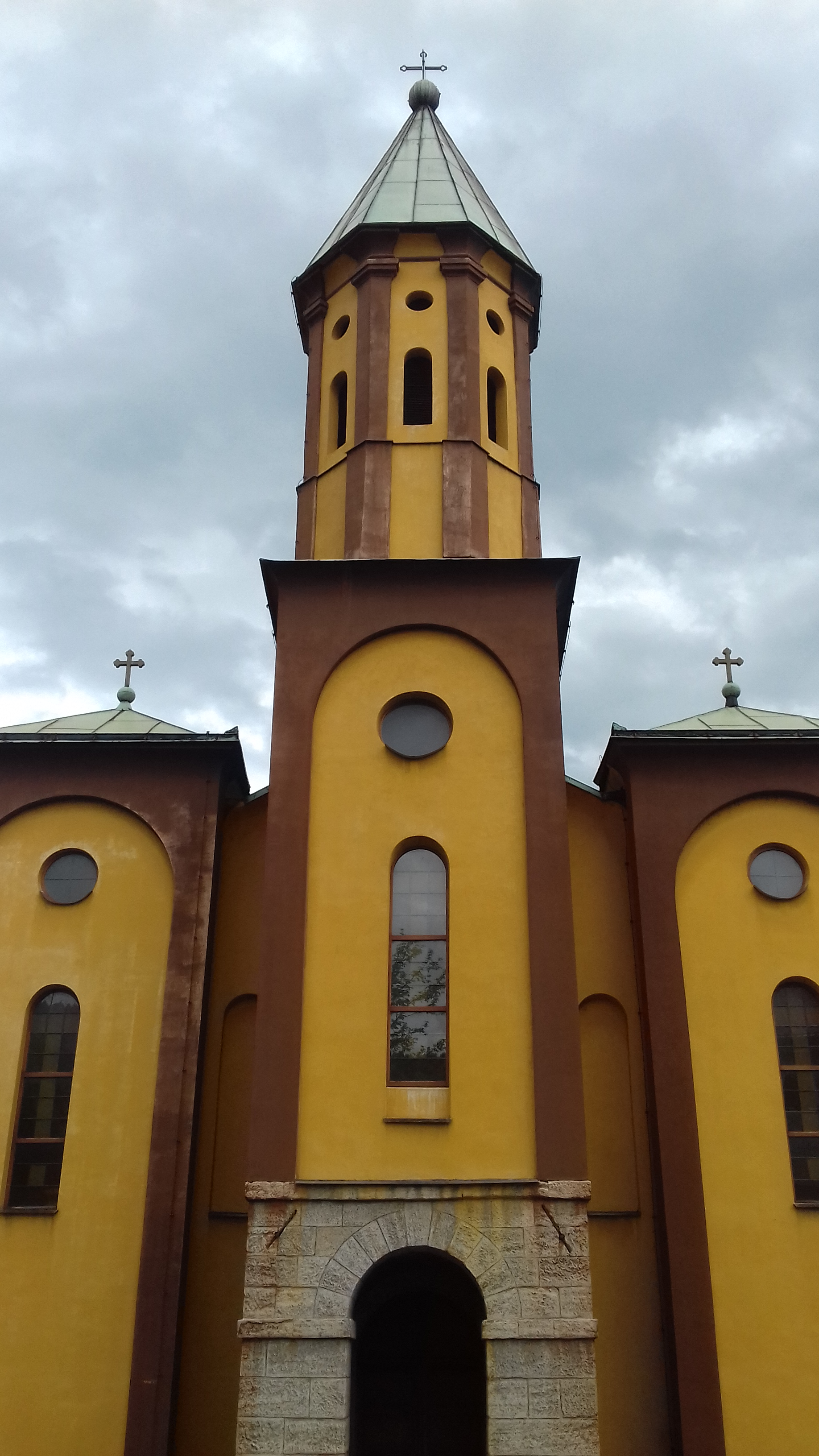 Жута СПЦ Богородице на Царини у Зеници